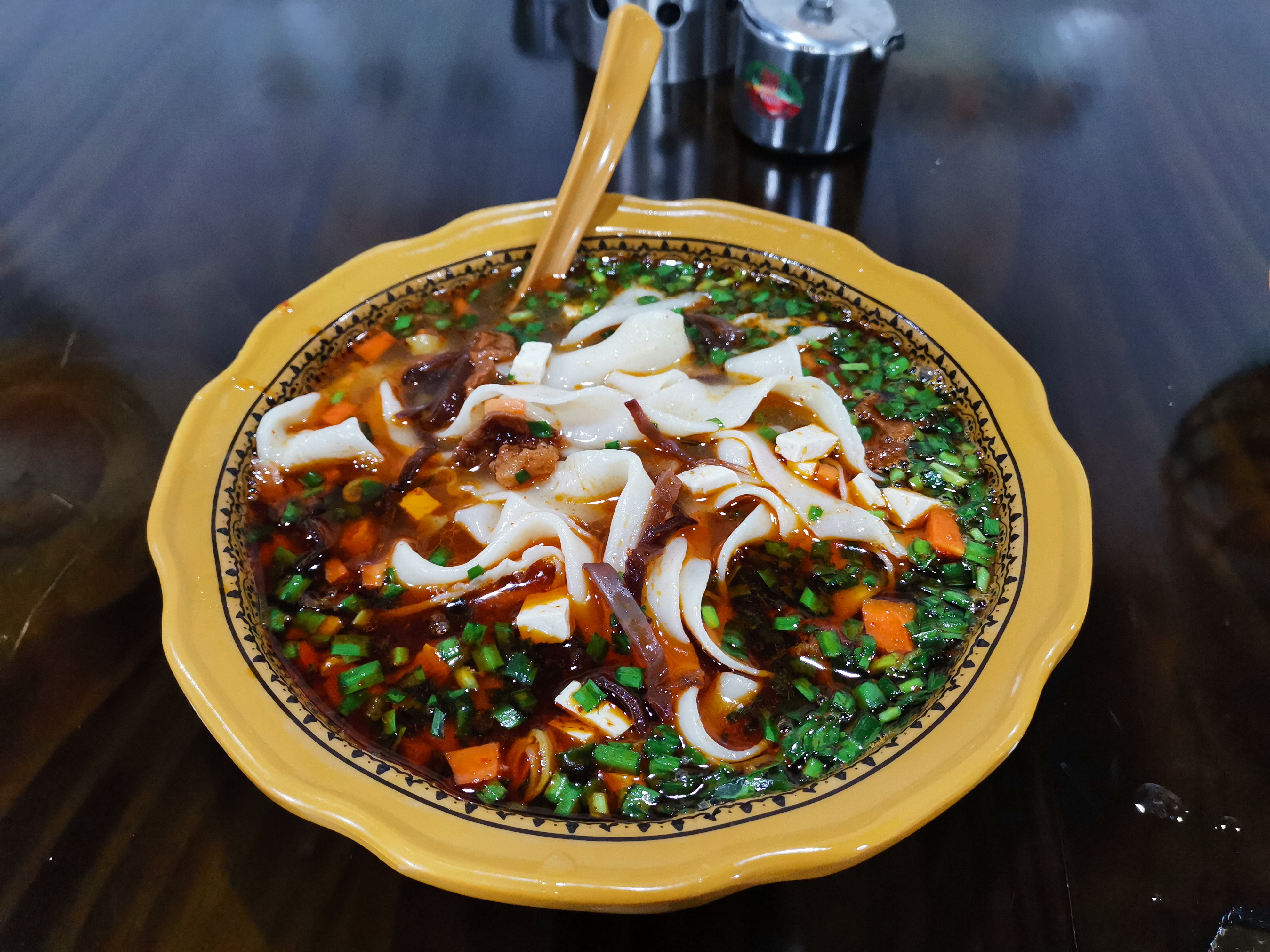 岐山臊子面